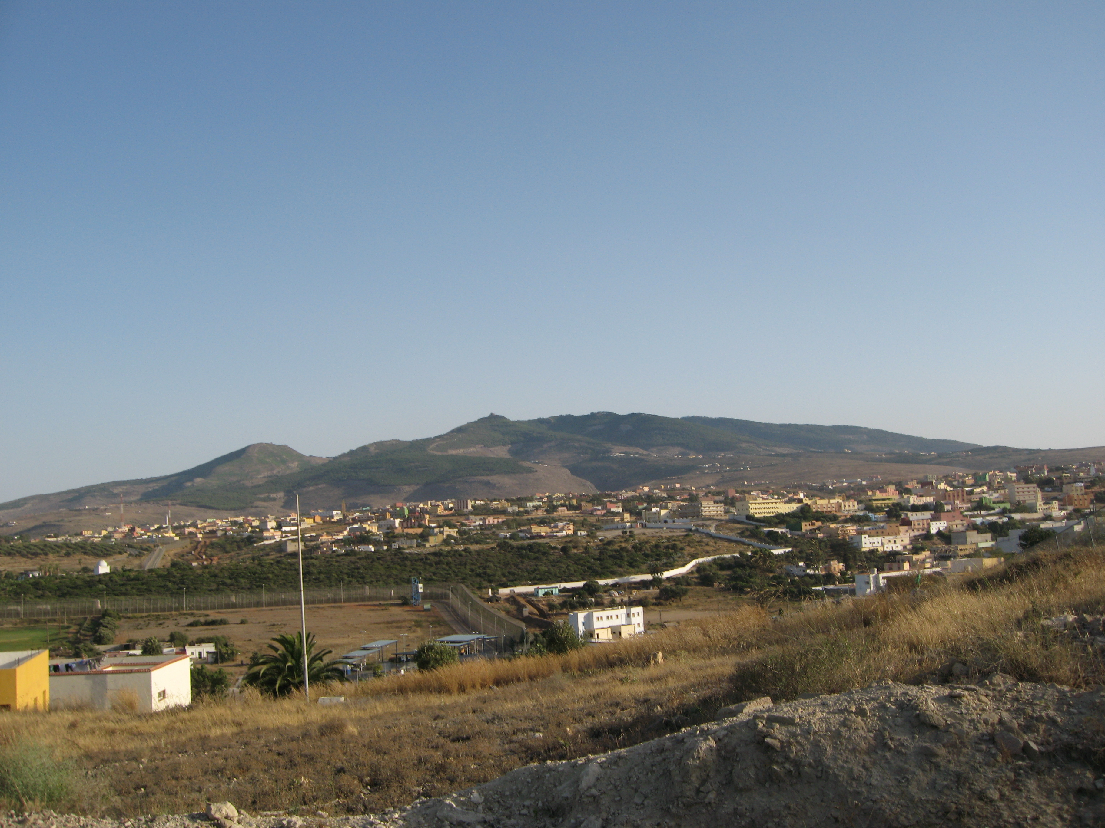 Vista del monte Gurugú desde Melilla. A sus pies, Farjana y, en primer plano, casi escondido, el puesto fronterizo de Farjana